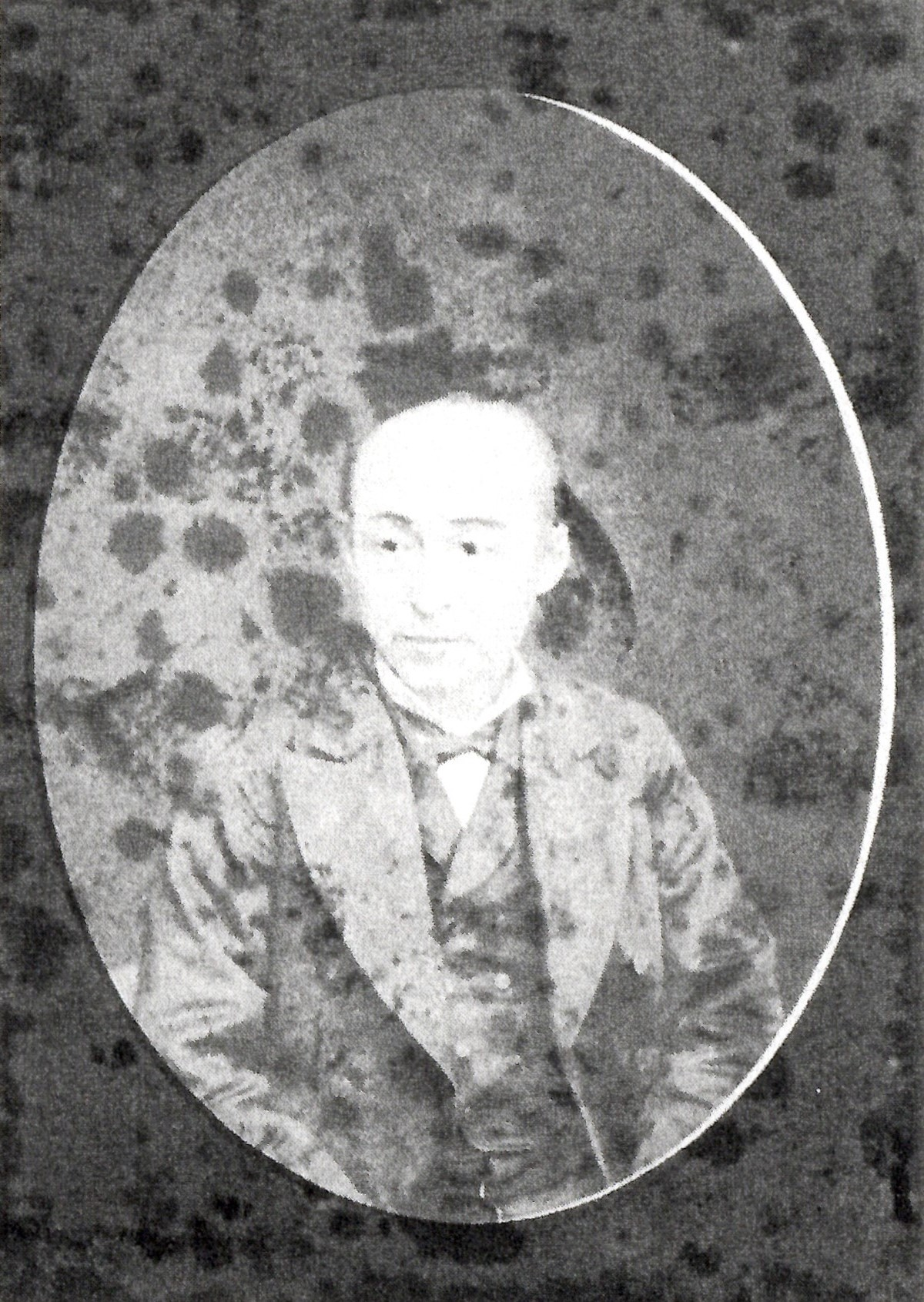 勘解由小路資生の肖像写真。